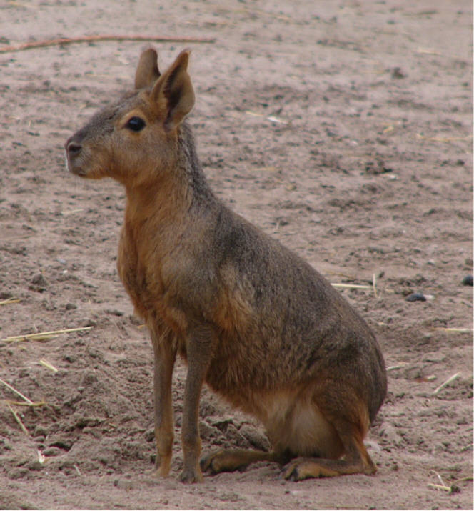 Das Foto zeigt einen großen Pampashasen (Mara) des Darmstädter Vivariums.